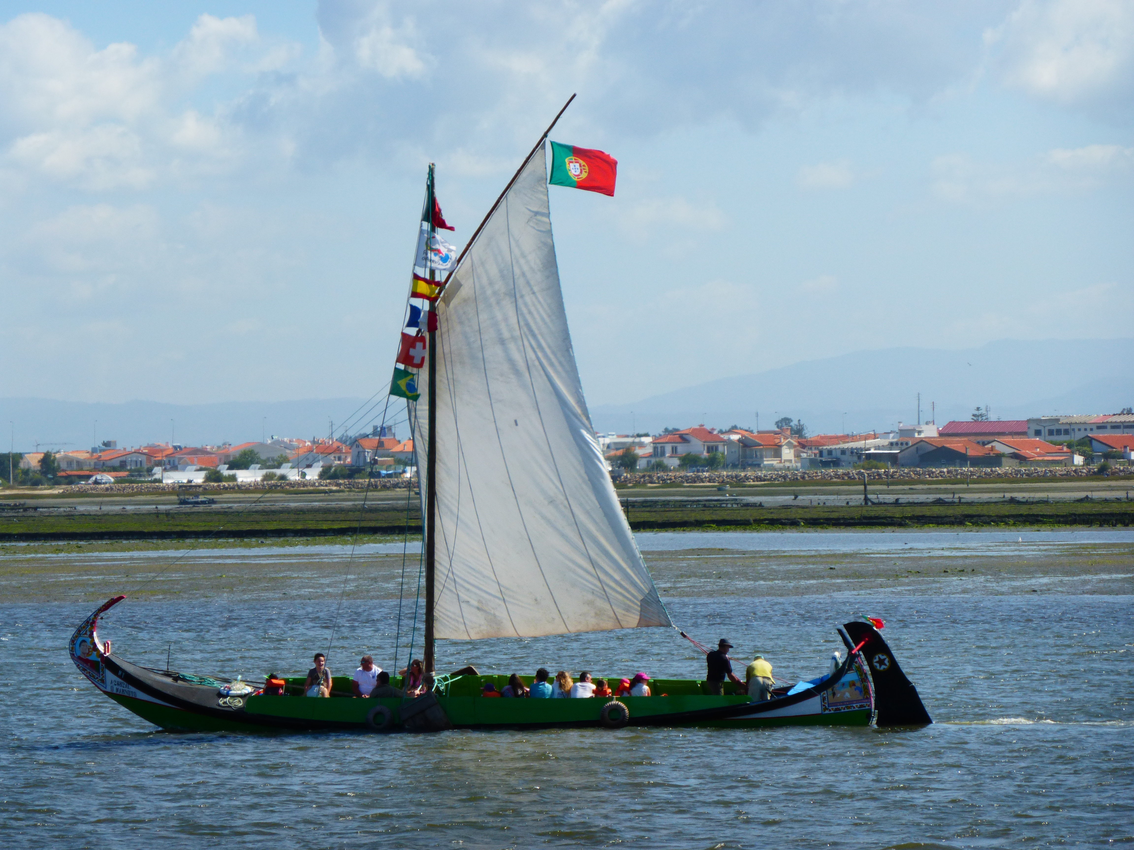 Un navire portugais traditionnel de la Ria de Aveiro